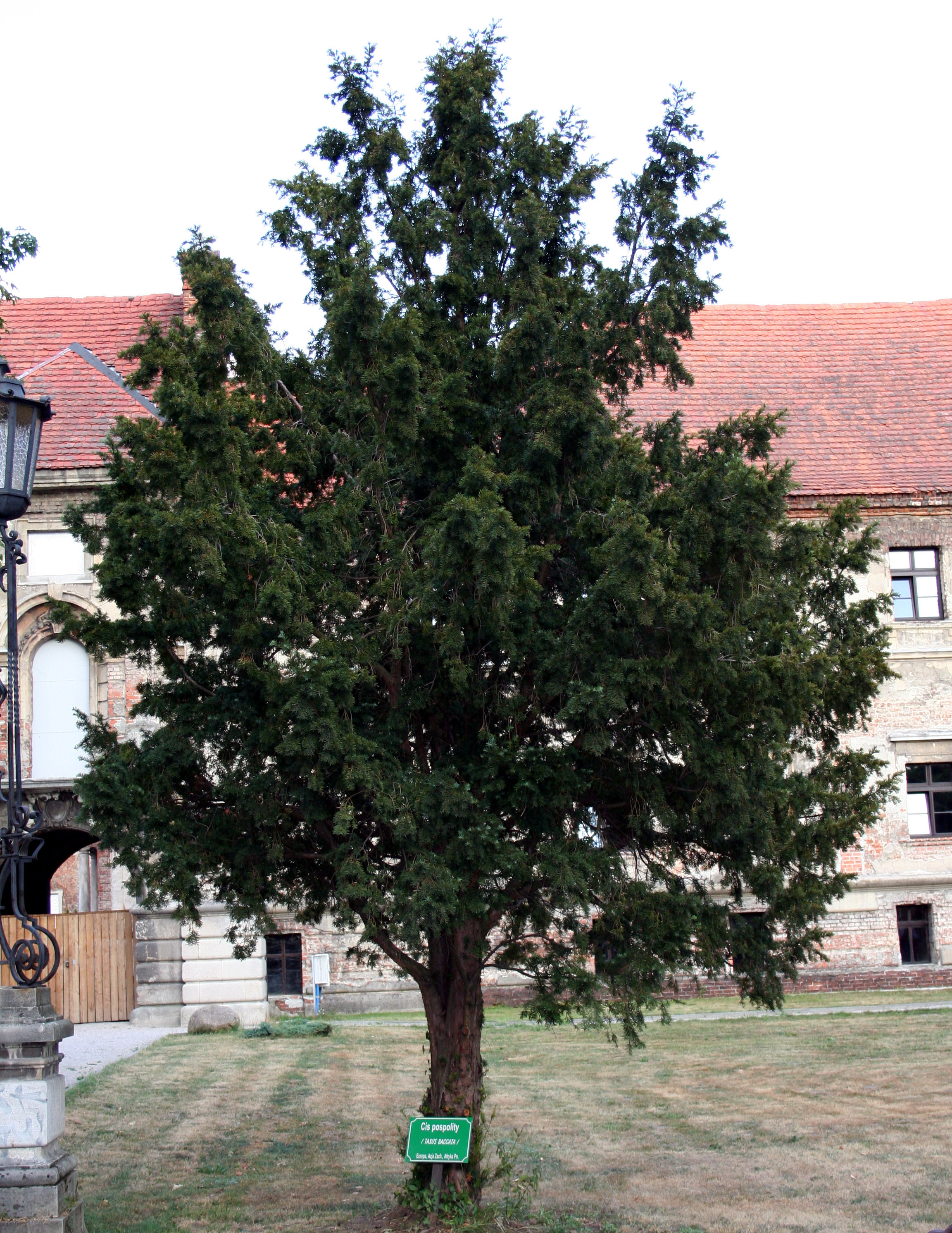 Cis_pospolity w parku przypałacowym w Rudach